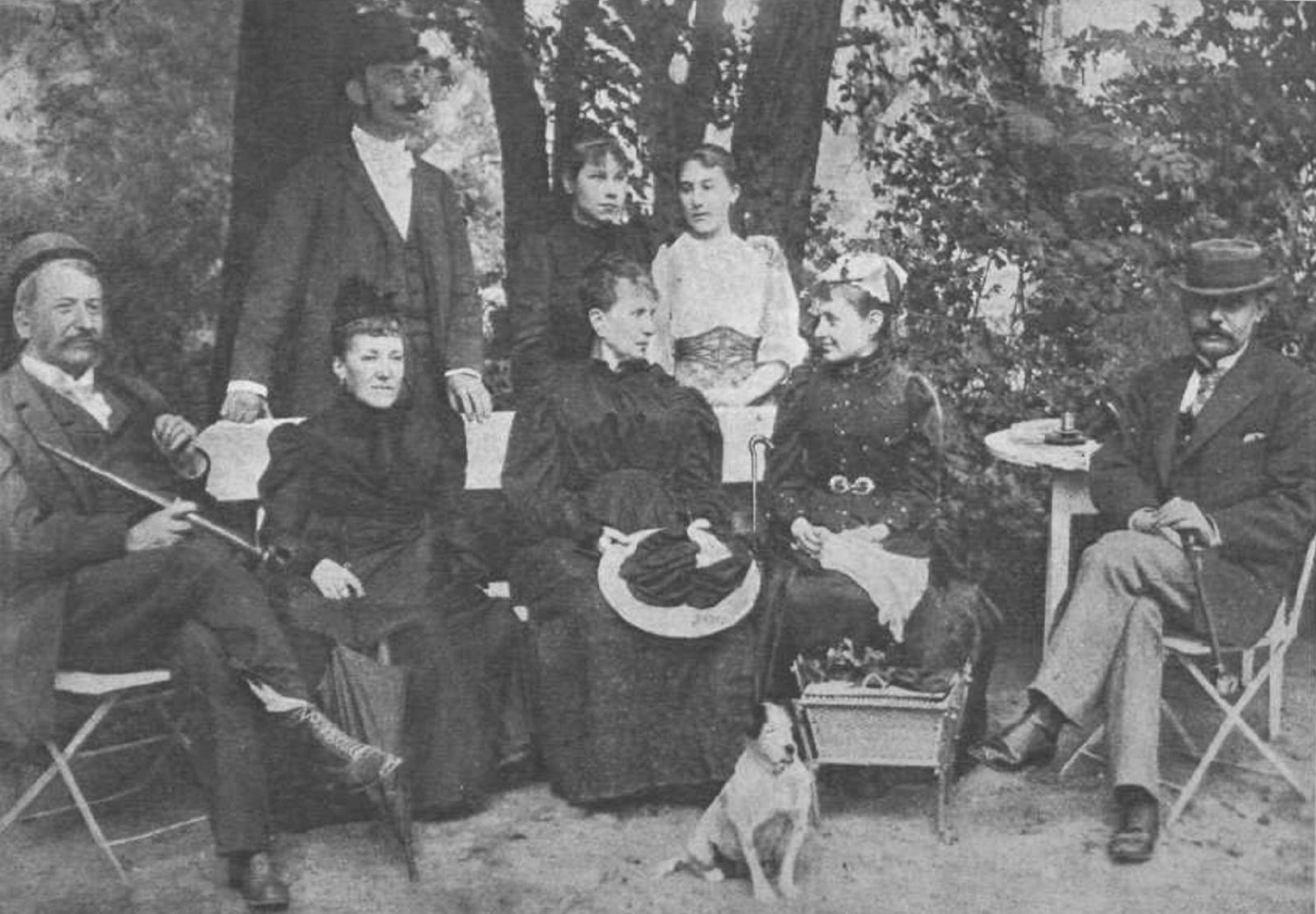 Andreánszky Gábor politikus, Mikszáth Kálmán és Jász Géza egy csoportképen